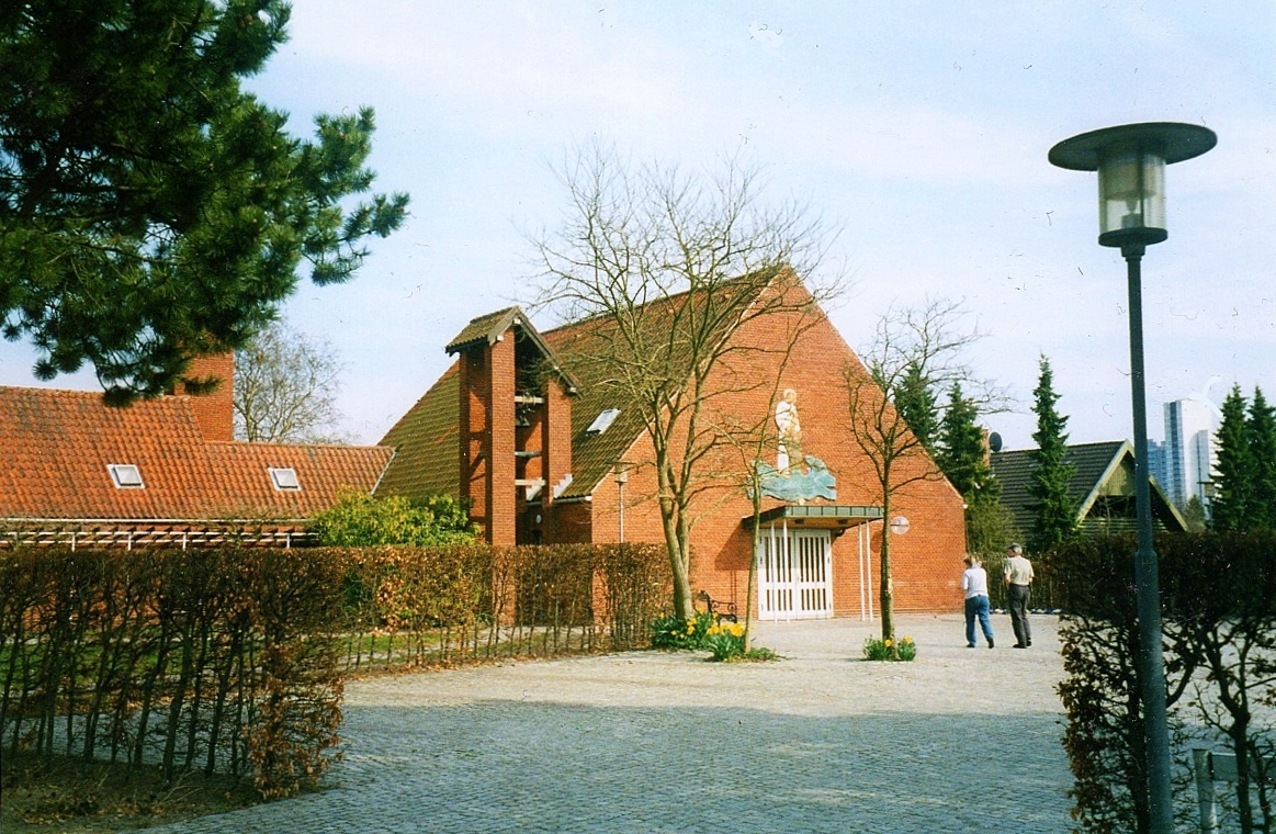 Birkholm Kirkesal, Lindehøj Sogn, Herlev Kommune